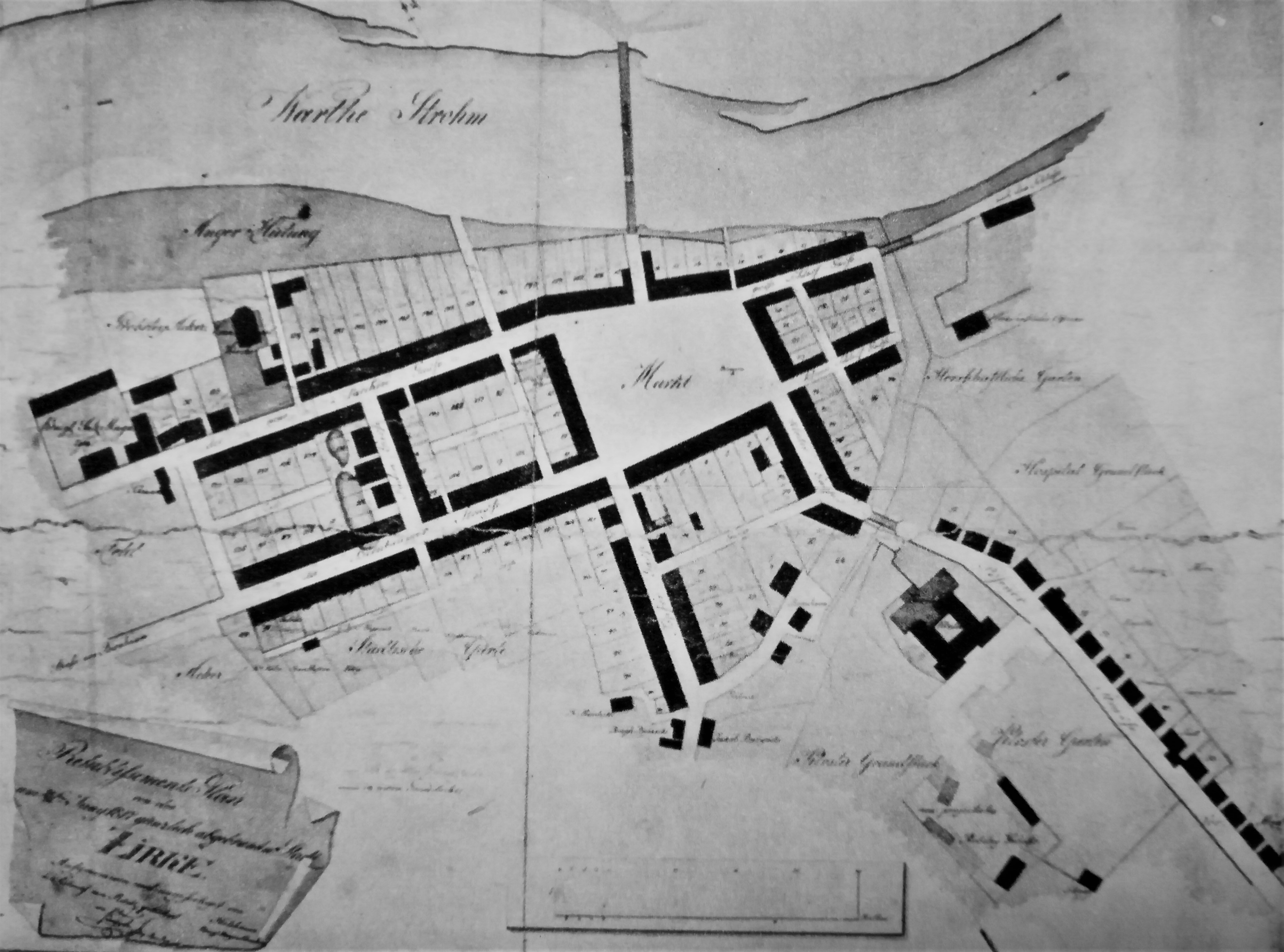 Plan Sierakowa autorstwa Holzhauera z 1817 r.